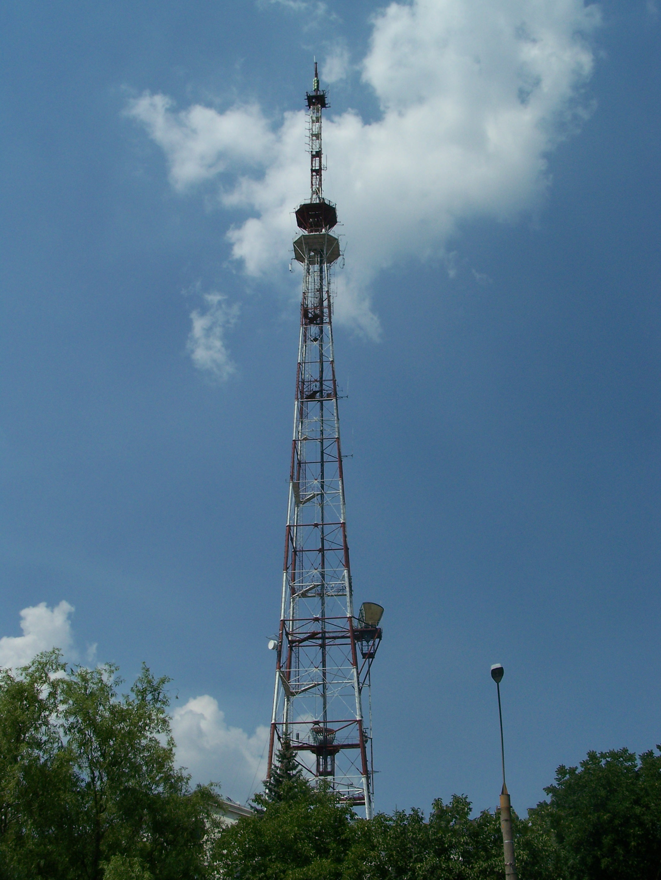 Кишинёвская телебашня